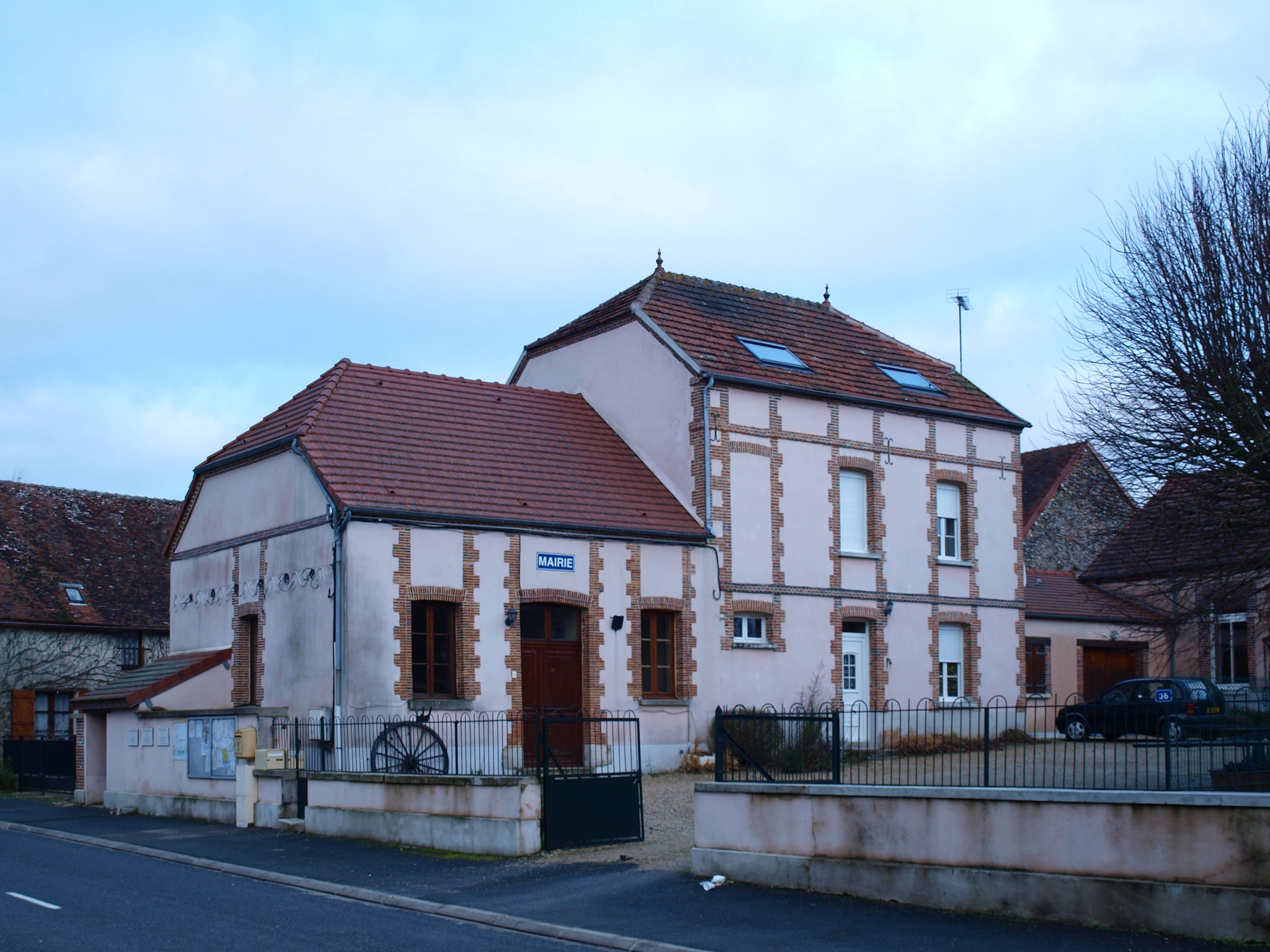 Champguyon (Marne, France) ; mairie.